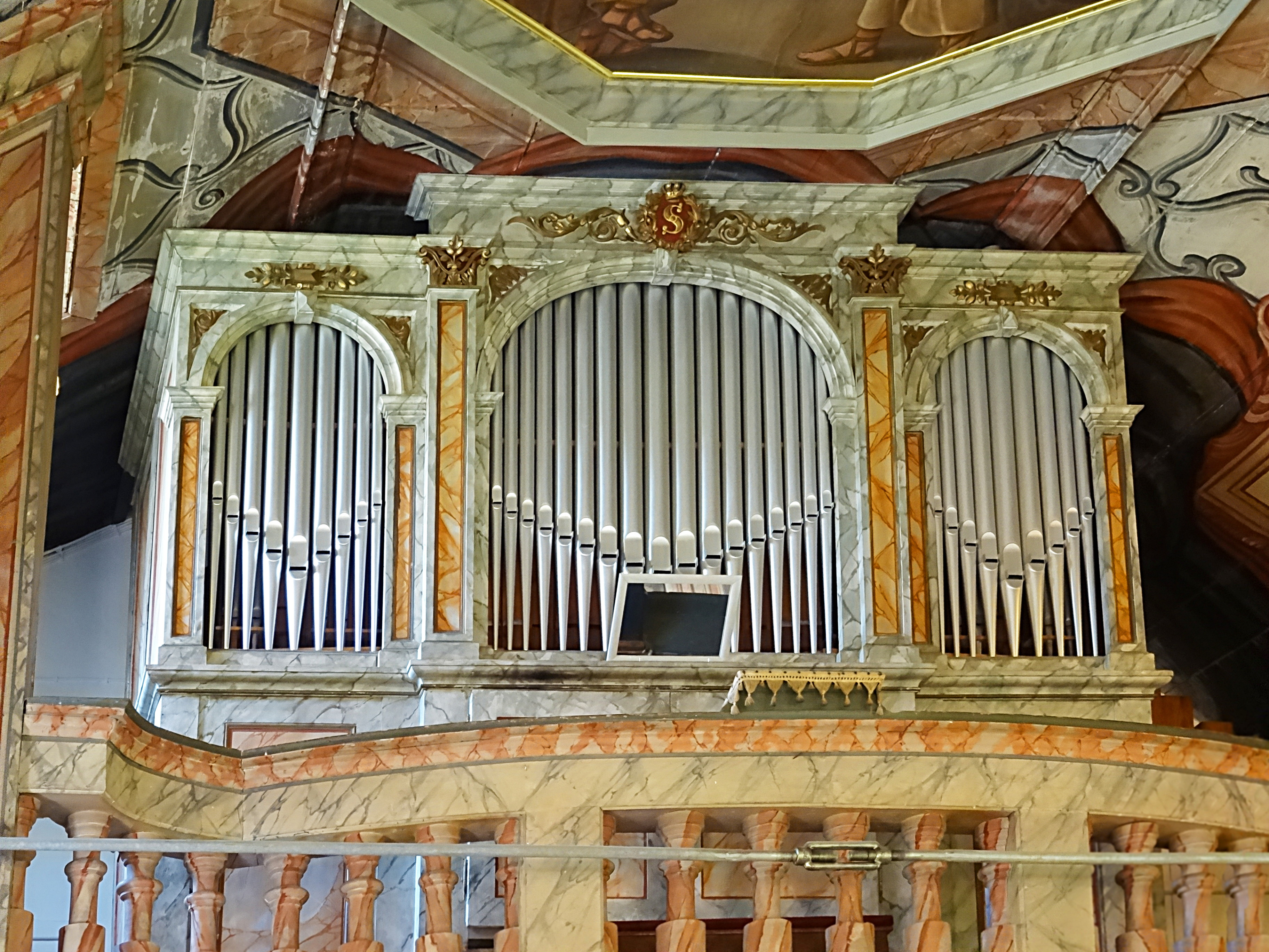 Orgel von Georg Markert aus Ostheim v.d.R. (1883, II/P 13) in der Barockkirche Seebach[1]